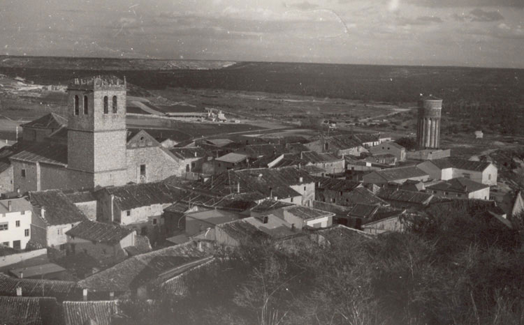 Vista panorámica - Portillo (Valladolid) - Fotografía 140 x 90 B/N